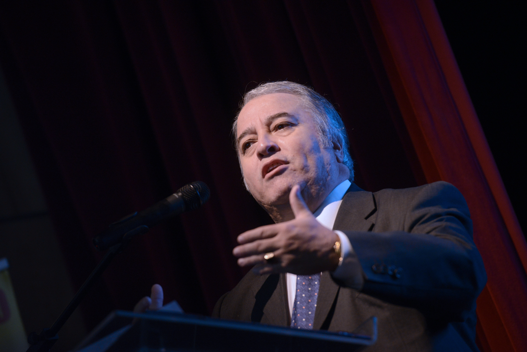 Ministro Álvaro Elizalde Presenta Cuenta Pública en Centro Cultural de la Comuna de La Cisterna